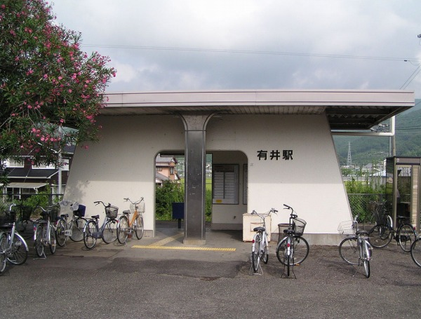 Arii Station, Kumano, Mie, Japan